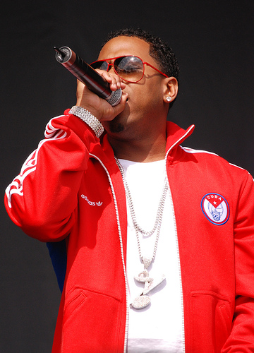 Bobby Valentino en concert au Centennial Park